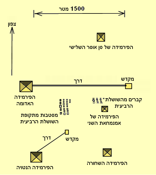 דחשור